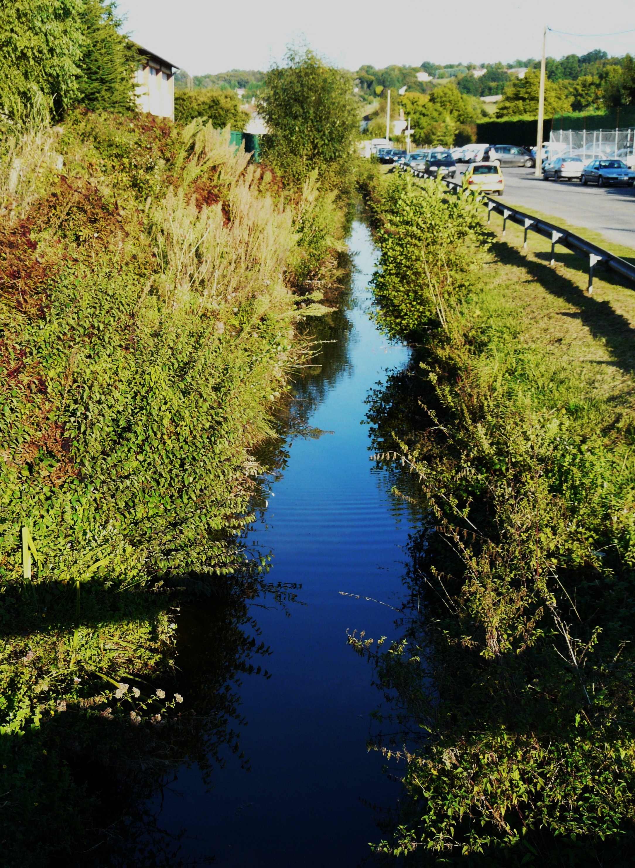 Le Vern à Vergt, Dordogne, France